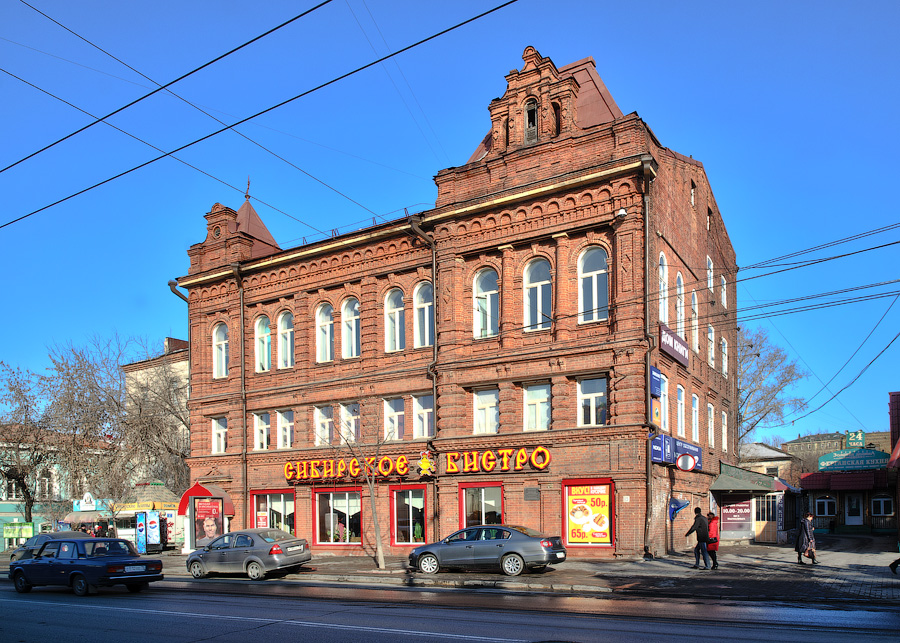 Доходный дом Некрасовой Е. (Томская область, Томск, Ленина проспект, 123)